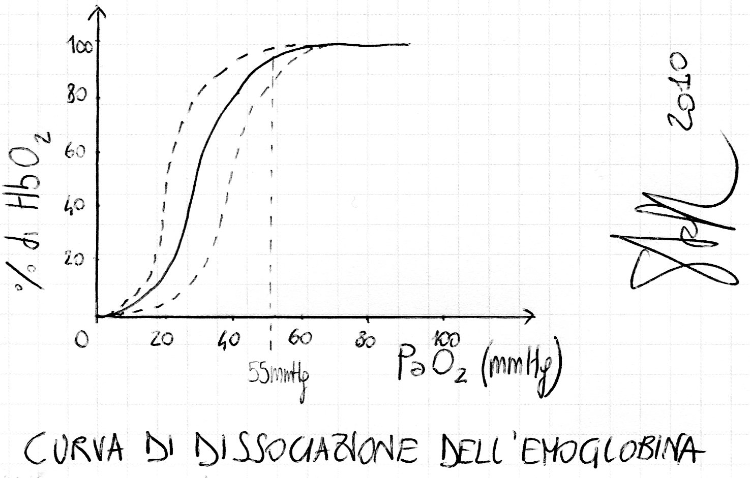 Il disegno molto rudimentale si propone di illustrare la curva di dissociazione dell'emoglobina